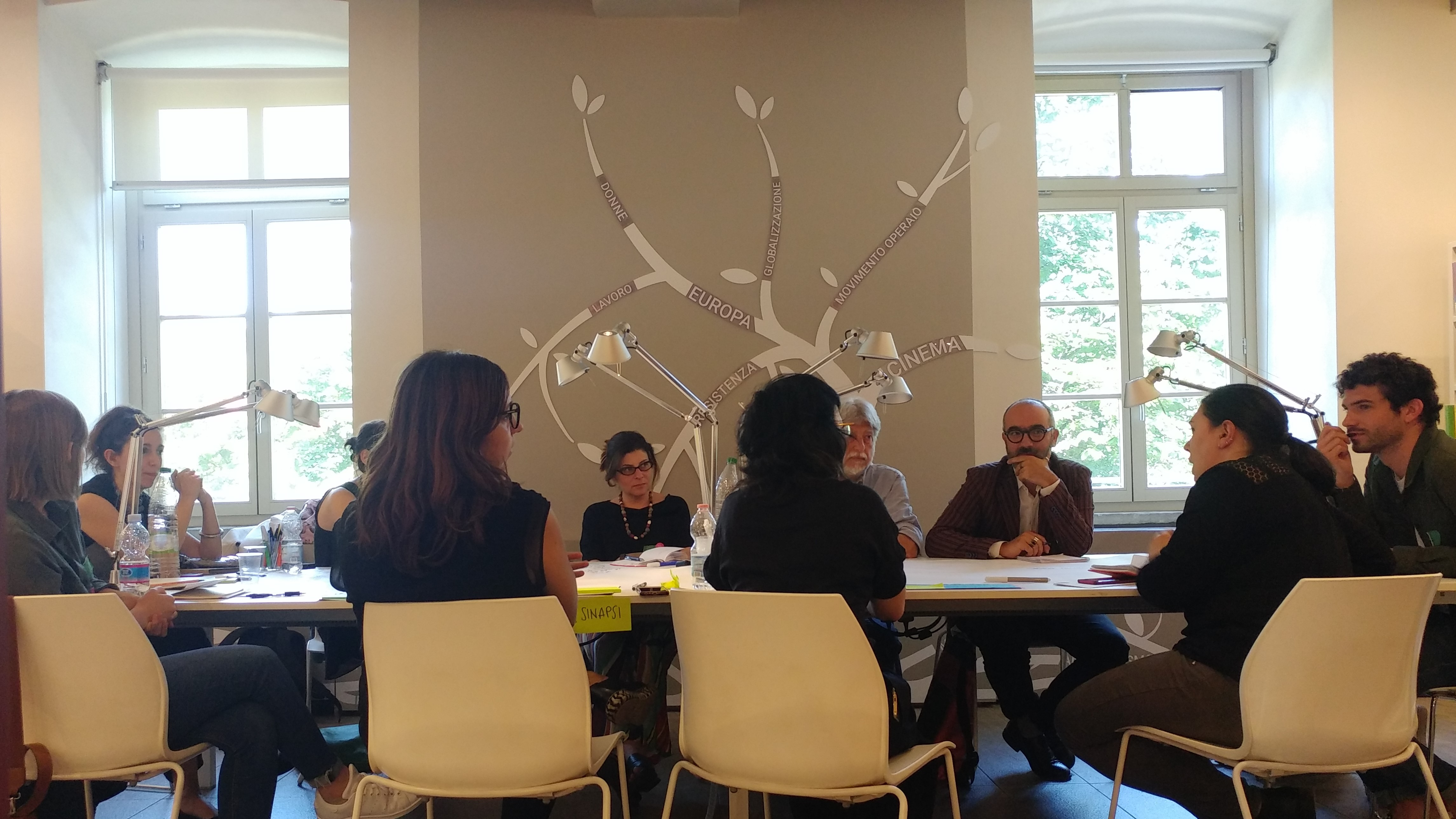 L'albero delle parole chiave del Polo del'900 presenti in sala lettura